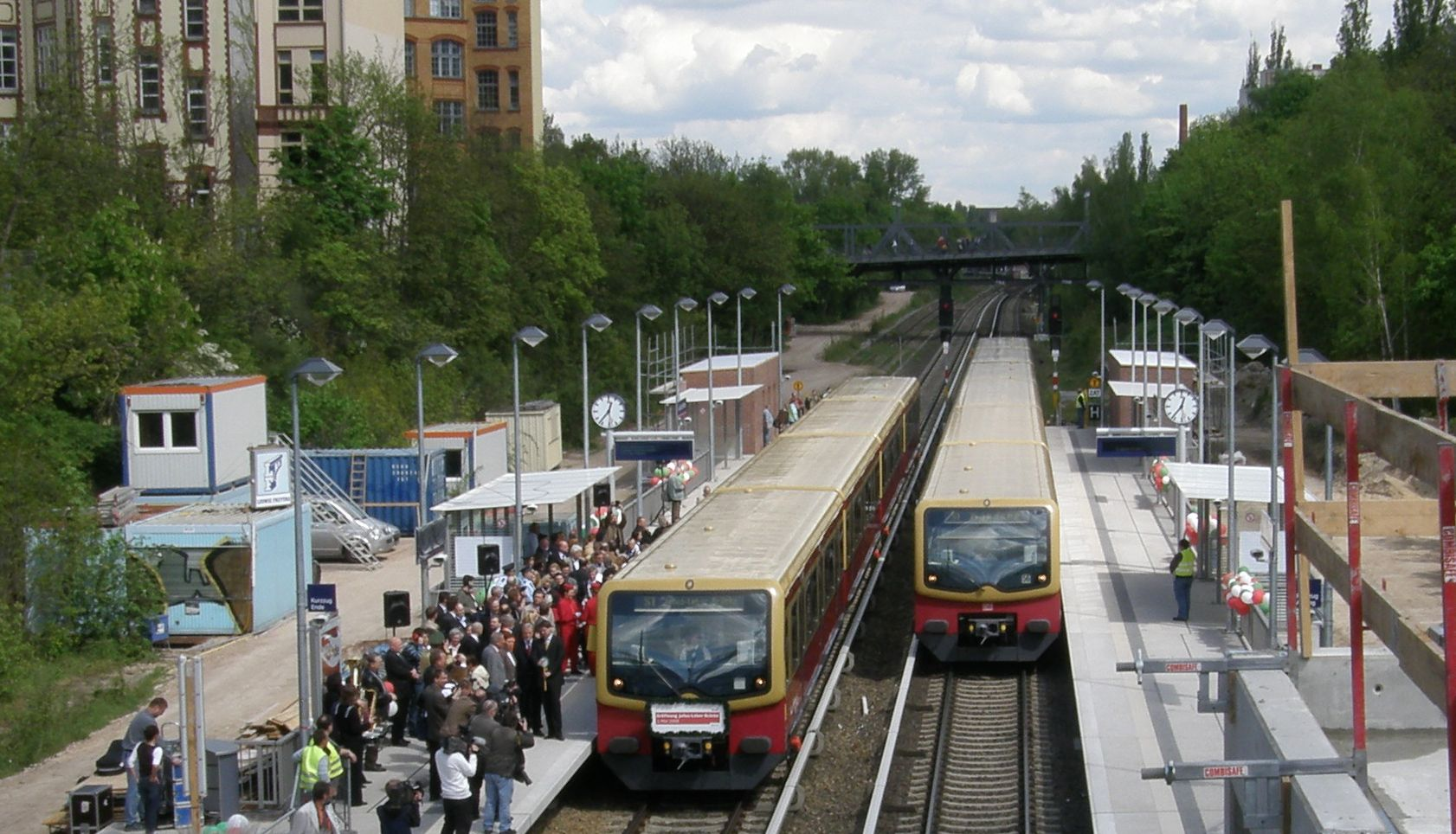 Eröffnung des S-Bahnhofs Julius-Leber-Brücke in Berlin-Schöneberg